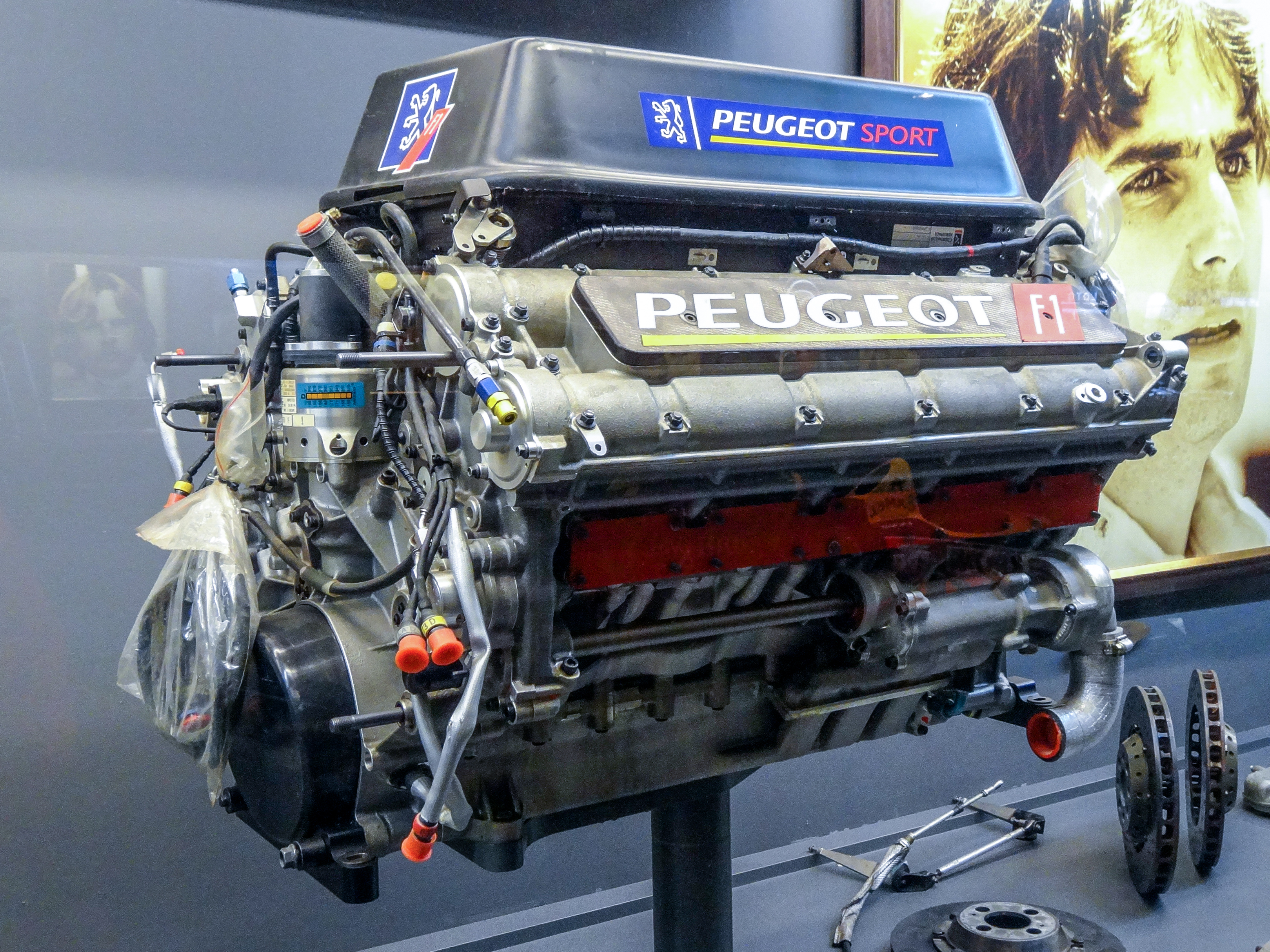 3.5 760cv à 14500tr/min 133kg McLaren MP4/9